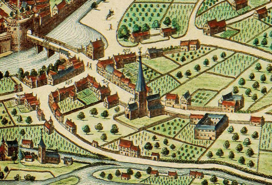 Carte de la Paroisse de Saint Remacle extrait de la Carte de Blaeu au XVIIe siècle